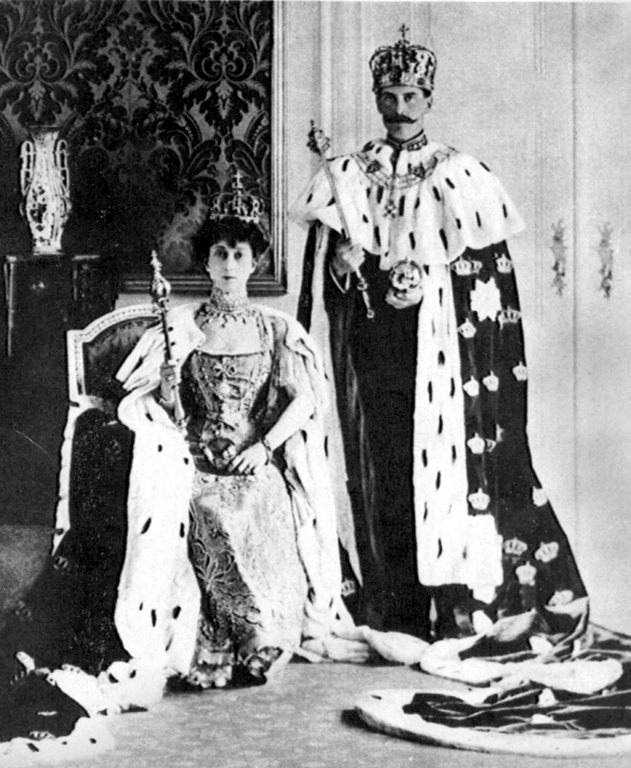 Kong Haakon og dronning Maud var iført staselige kapper i hermelin og fløyel under kroningen i 1906.